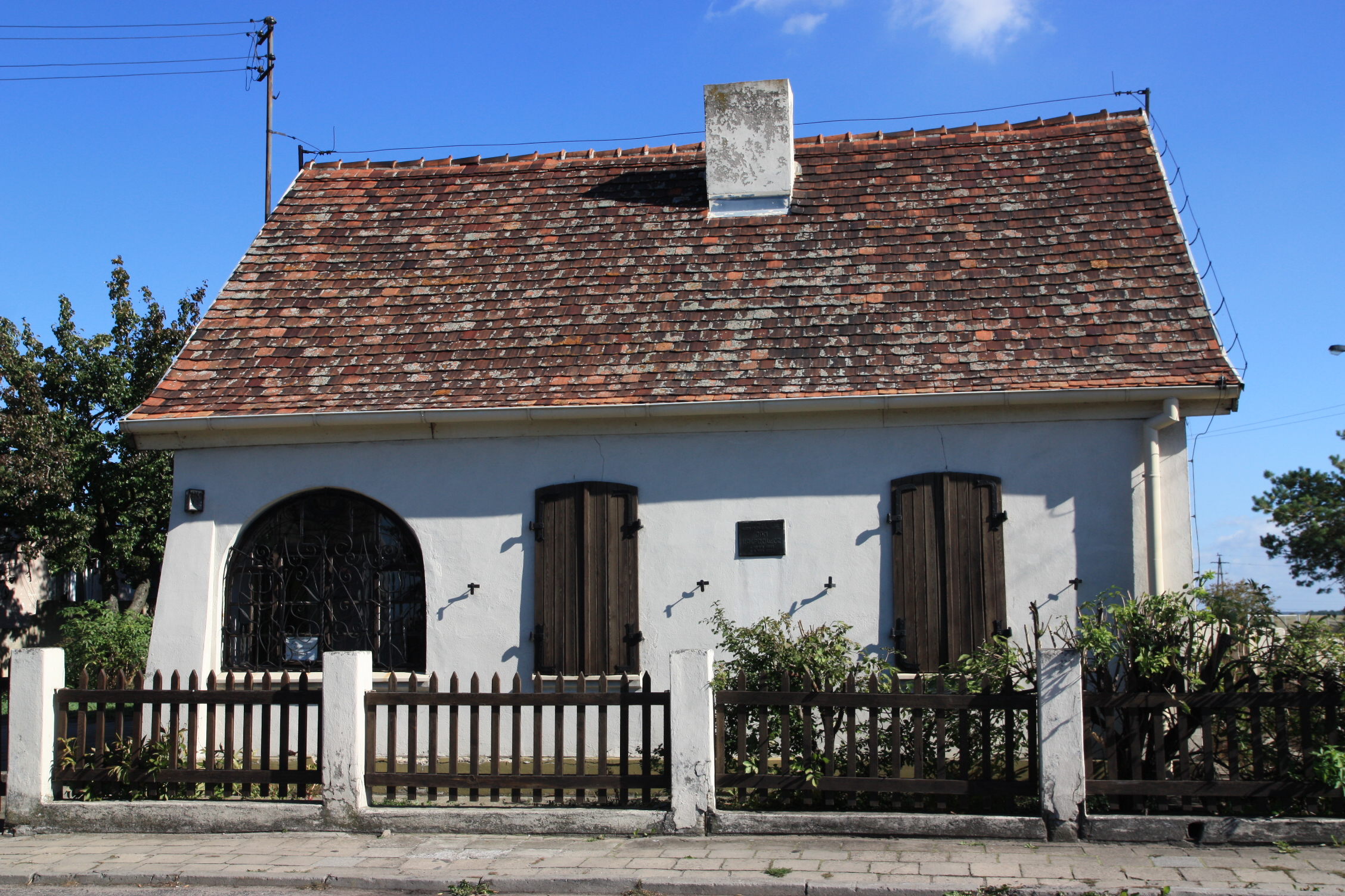 Inowrocław Szymborze, ul. Wielkopolska 11 - dom rodzinny Jana Kasprowicza (zabytek nr A/313/1)